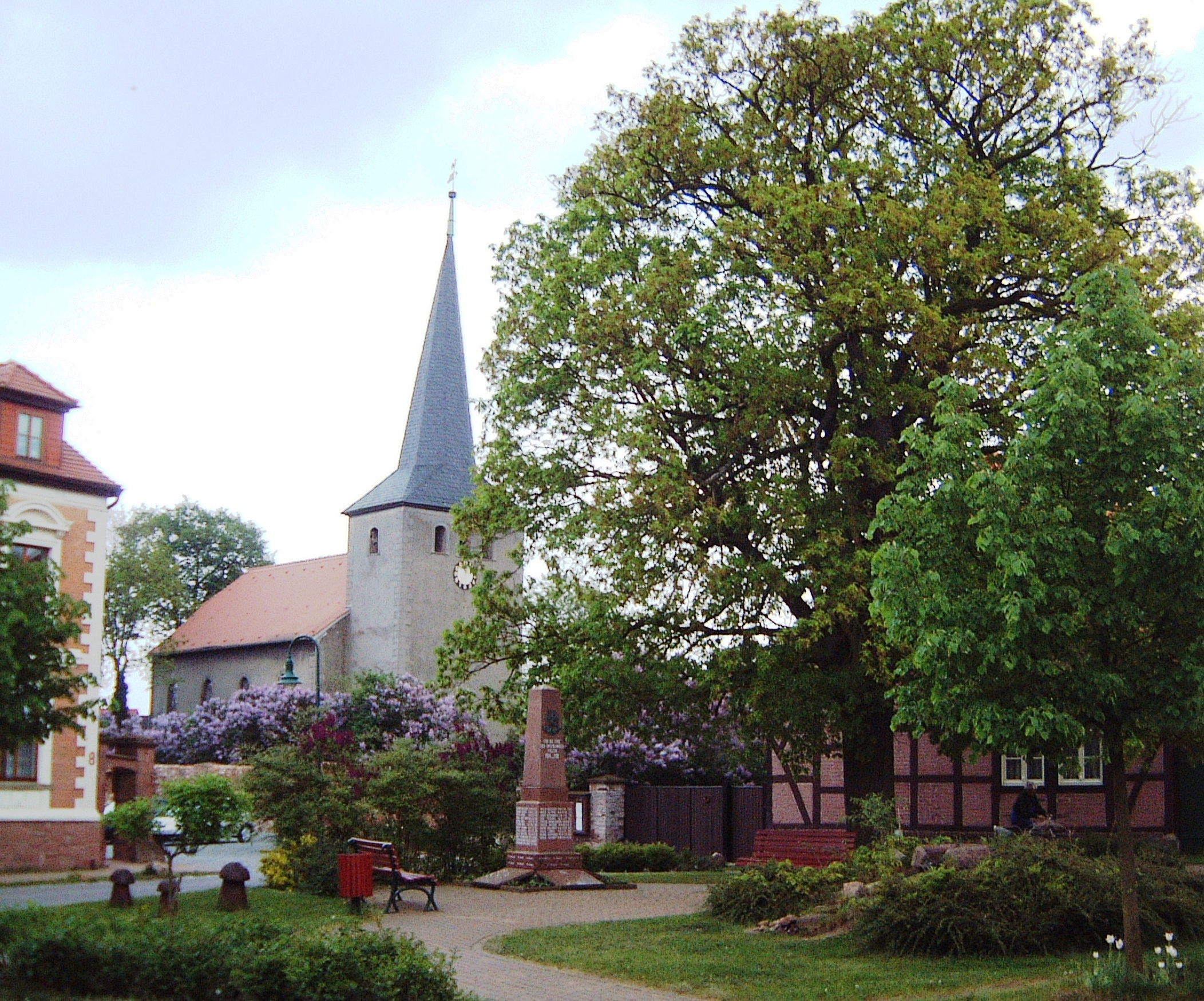 Kirche Bülstringen mit Pfarrhaus (Lindenplatz)